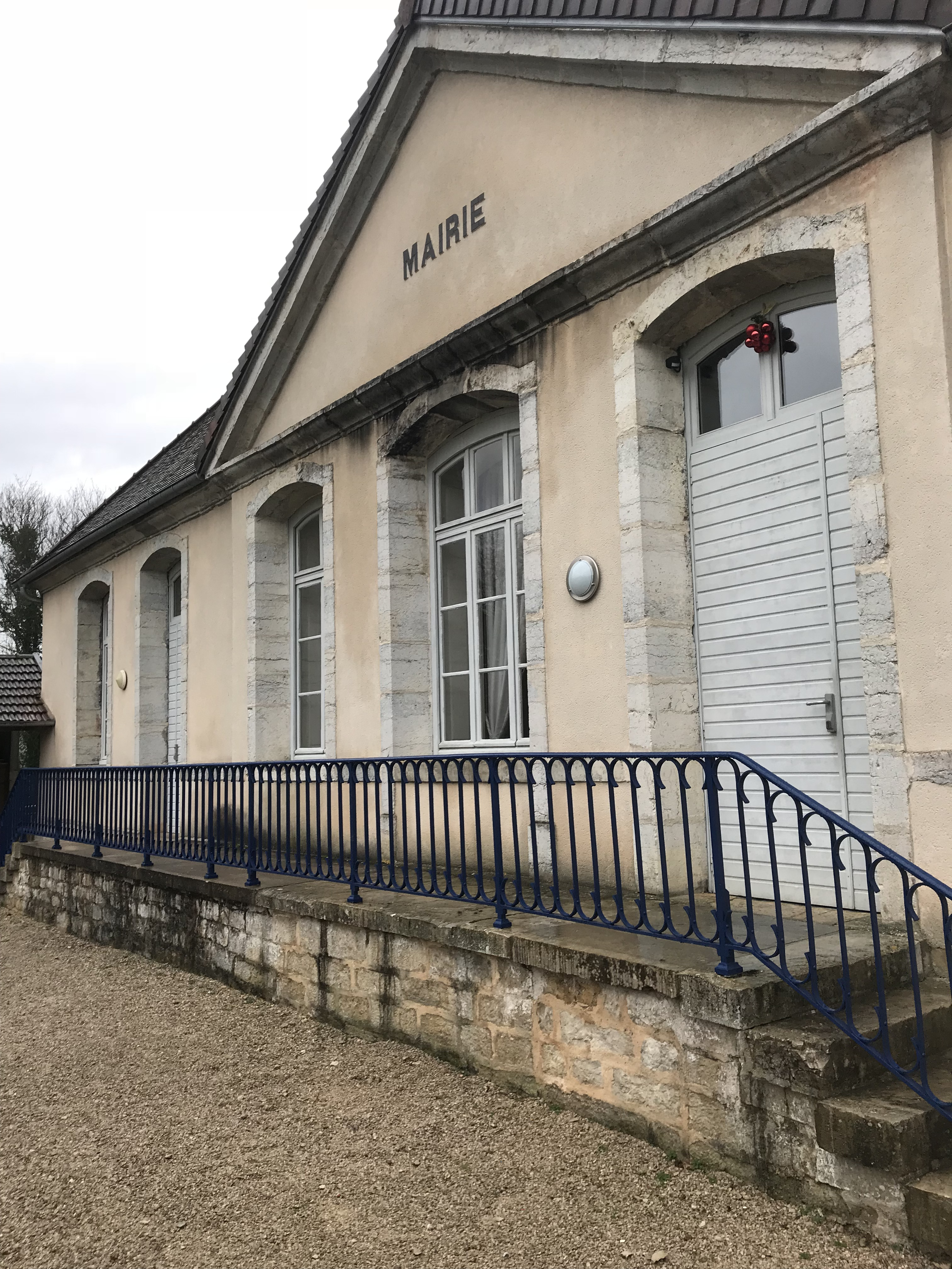 Champagne-sur-Loue (Jura) en janvier 2018.